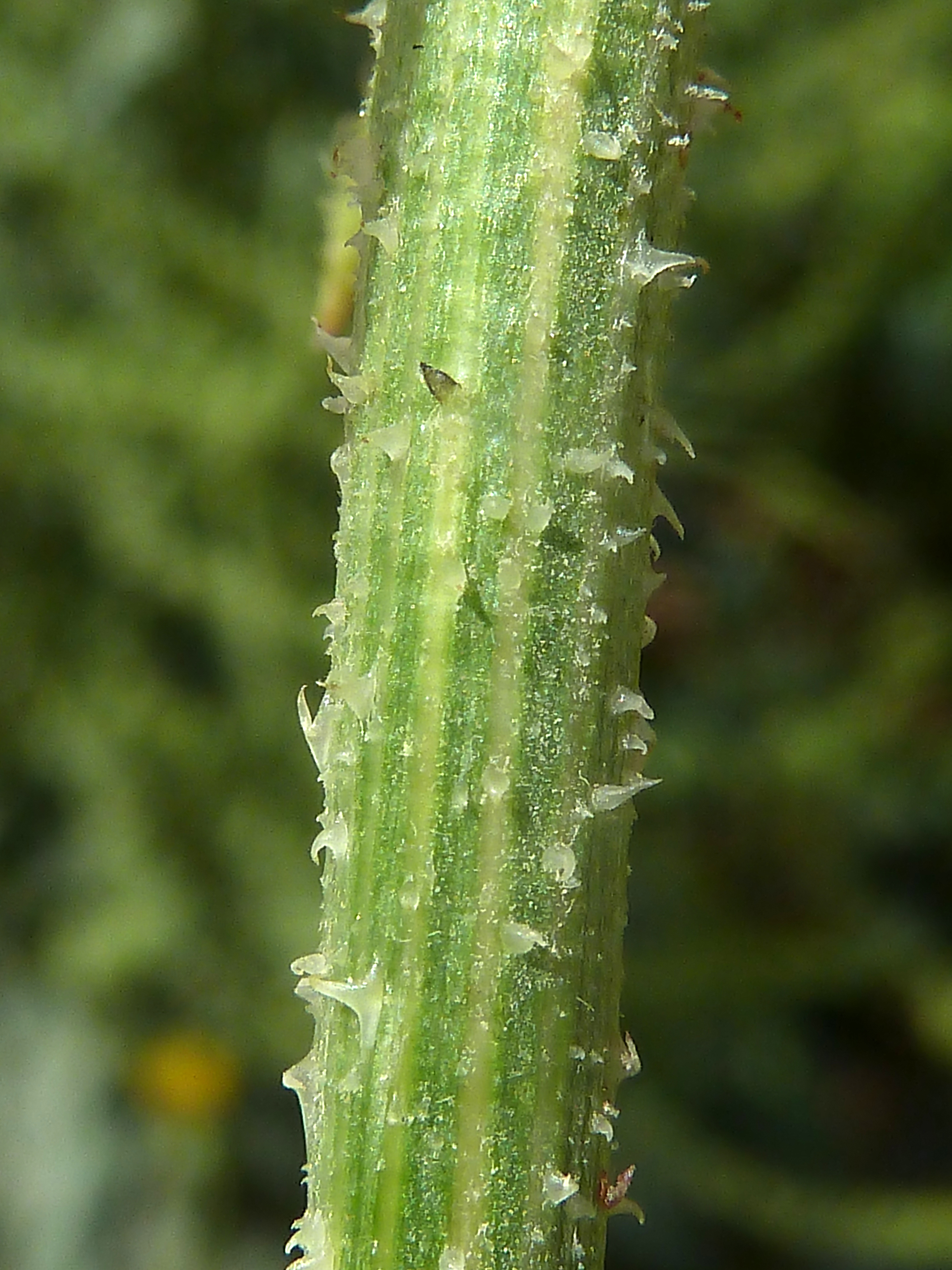 Urospermum picroides Tallo acostillado e híspido: - Descampado urbano, esquina calles San Antonio con Compositor Manuel García Berná, Albatera (Provincia de Alicante, España).